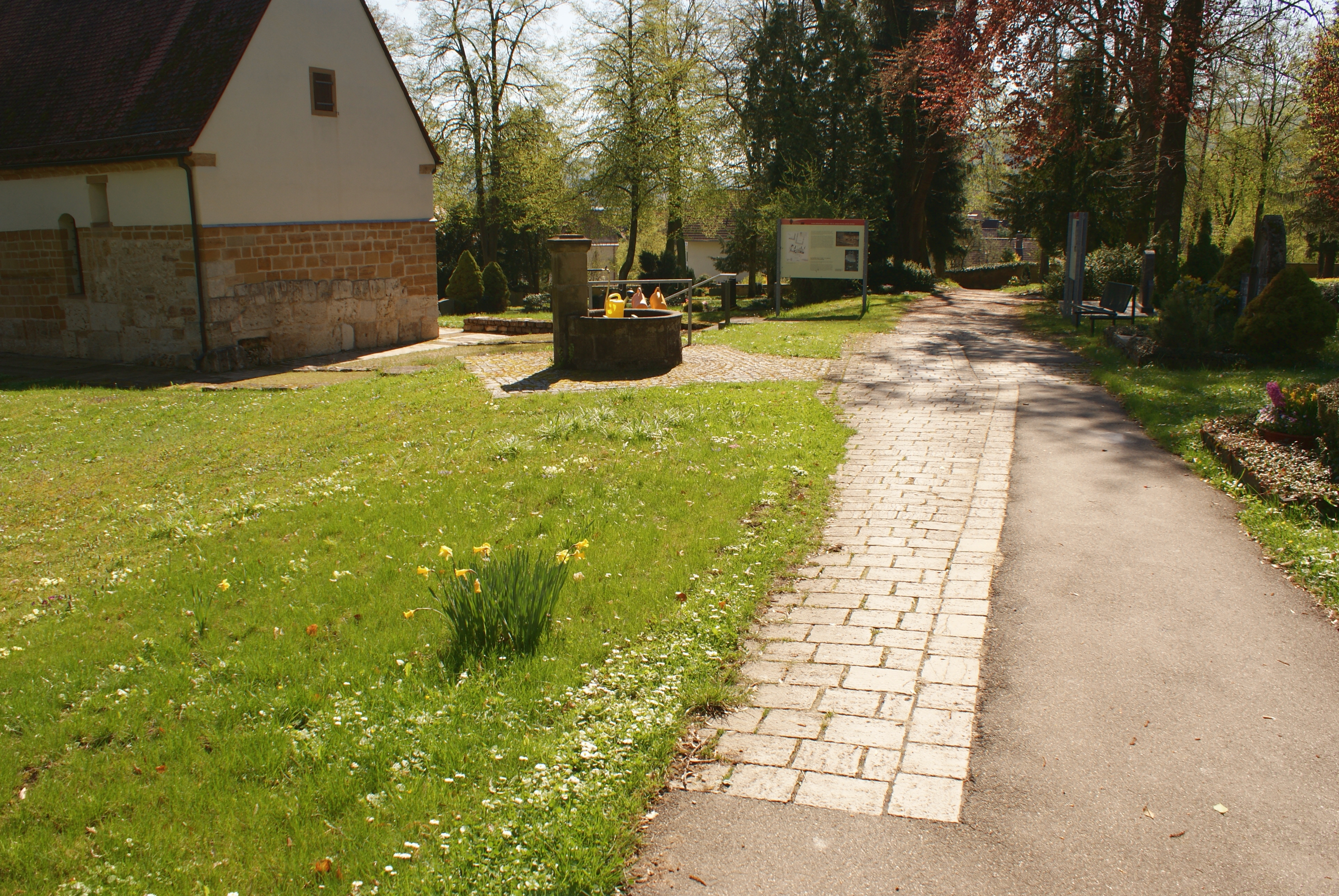 Kastell Aalen: Die Lage des Osttores ist auf dem Friedhof mit Pflastersteinen markiert. Im Fundamentbereich der Johanneskirche (links) sind römische Spolien verbaut.